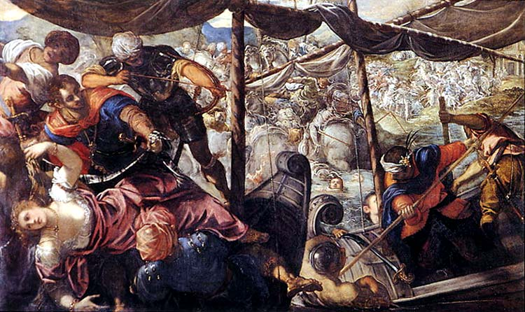 Lucha entre turcos y cristianos